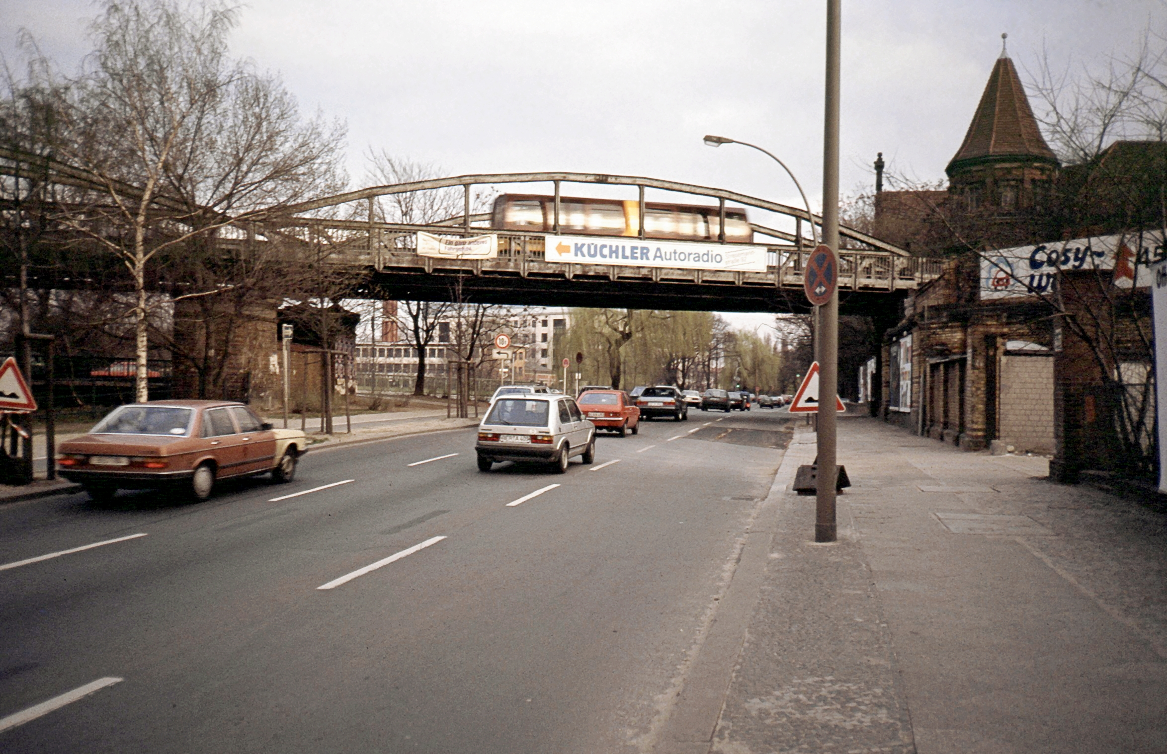 Berlin Schöneberger Ufer mit M-Bahn